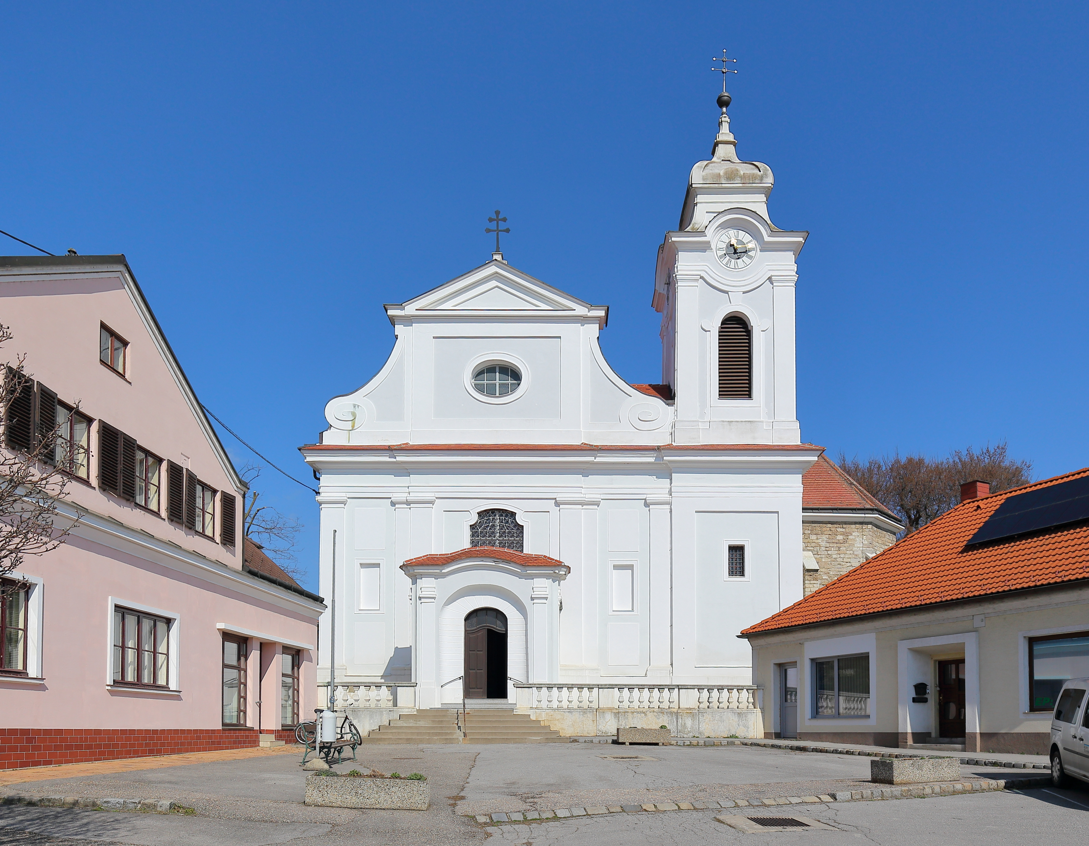 Haupt- bzw. Südfassade der römisch-katholischen Pfarrkirche hl. Nikolaus in der niederösterreichischen Marktgemeinde Wilfersdorf.Eine spätbarocke Saalkirche, die von 1742 bis 1744 von Andreas Hammer errichtet wurde. Der Chor der ehemaligen gotischen Pfarrkirche Maria Himmelfahrt wurde in den Sakralbau integriert, schließt ostseitig an das Langhaus an und dient als Kapelle.